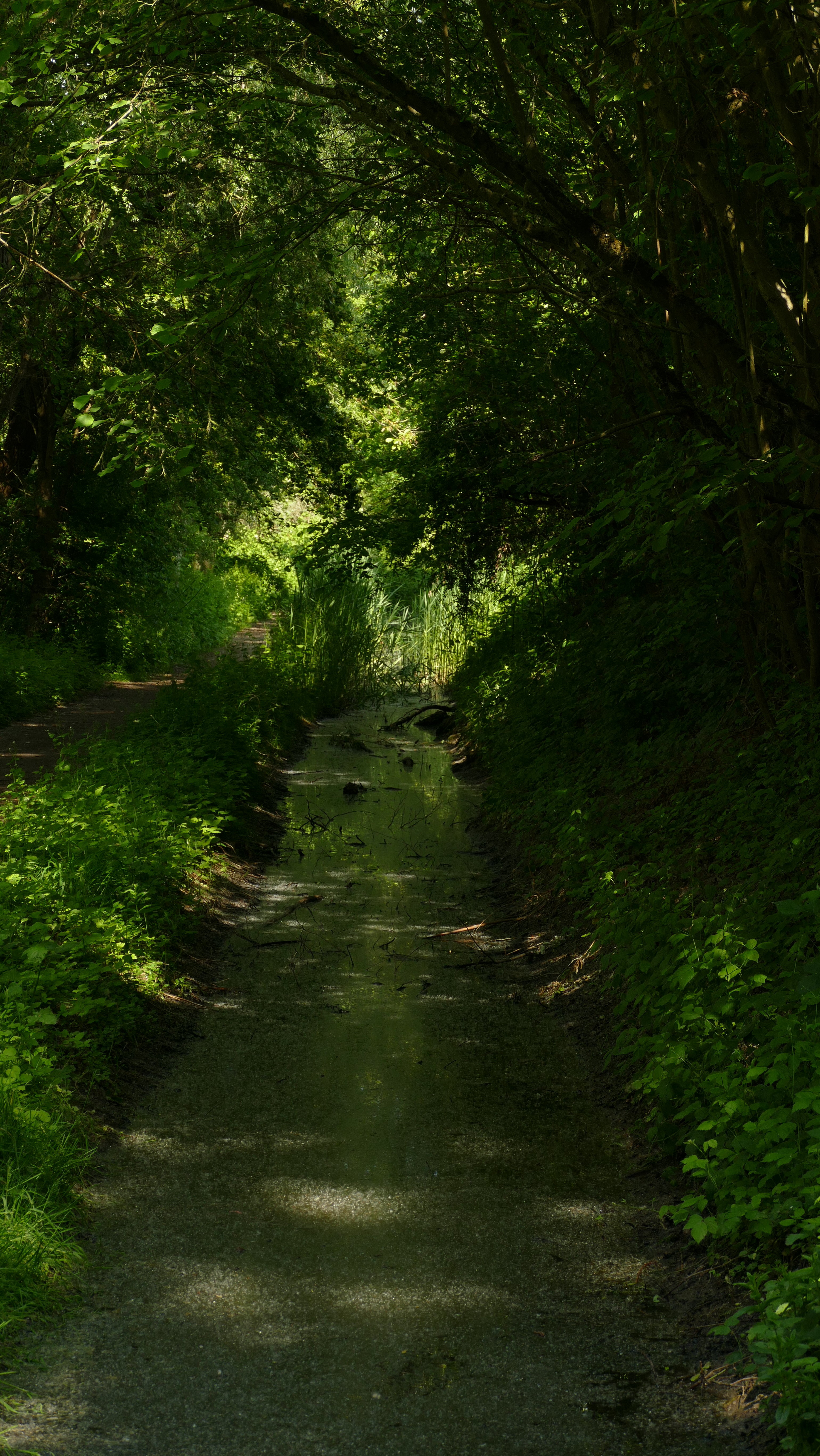 Riedgraben am Seckbacher Ried in Frankfurt